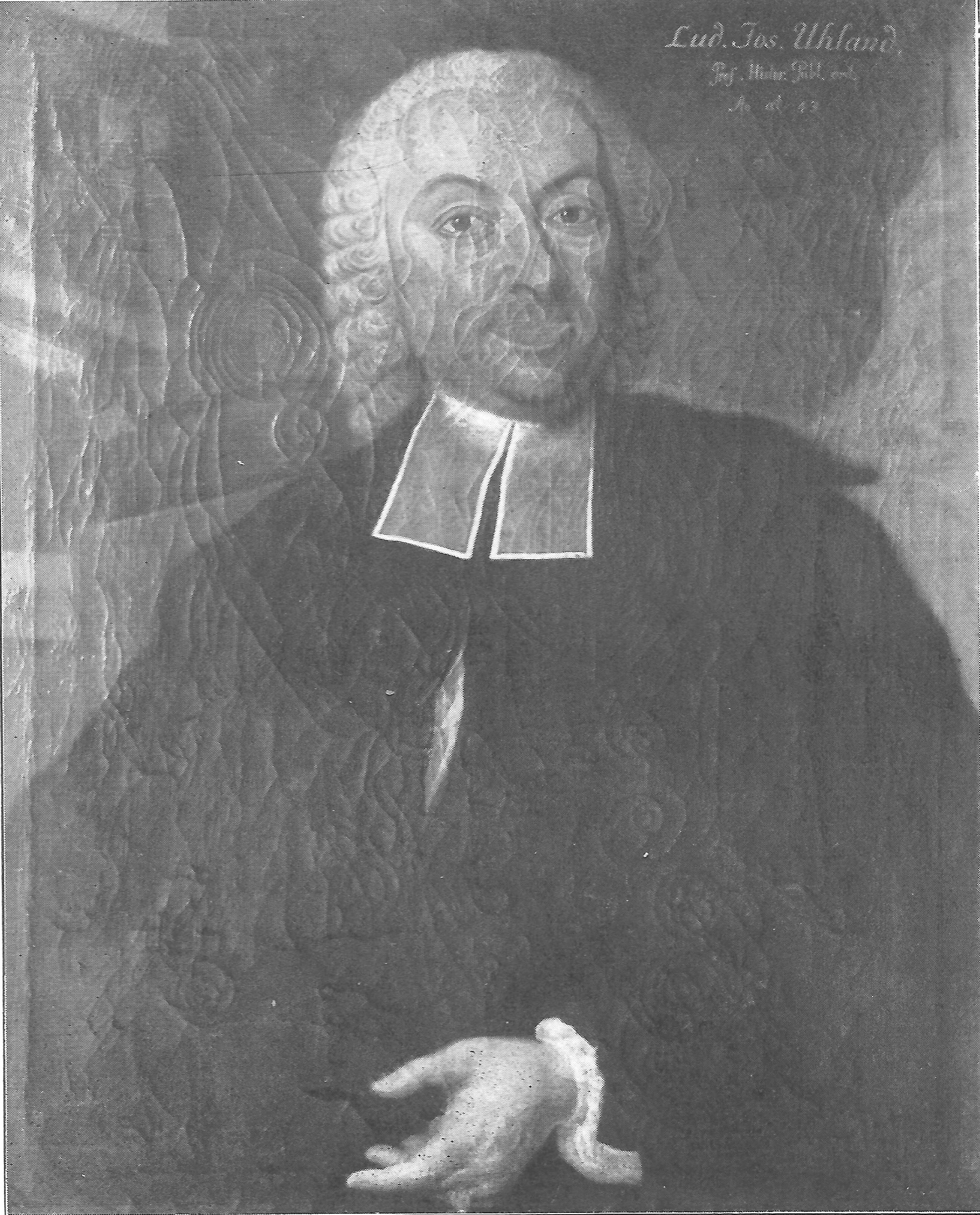 Ludwig Josef Uhland, Porträt in der Tübinger Professorengalerie. Öl auf Leinwand, 78 × 62 cm